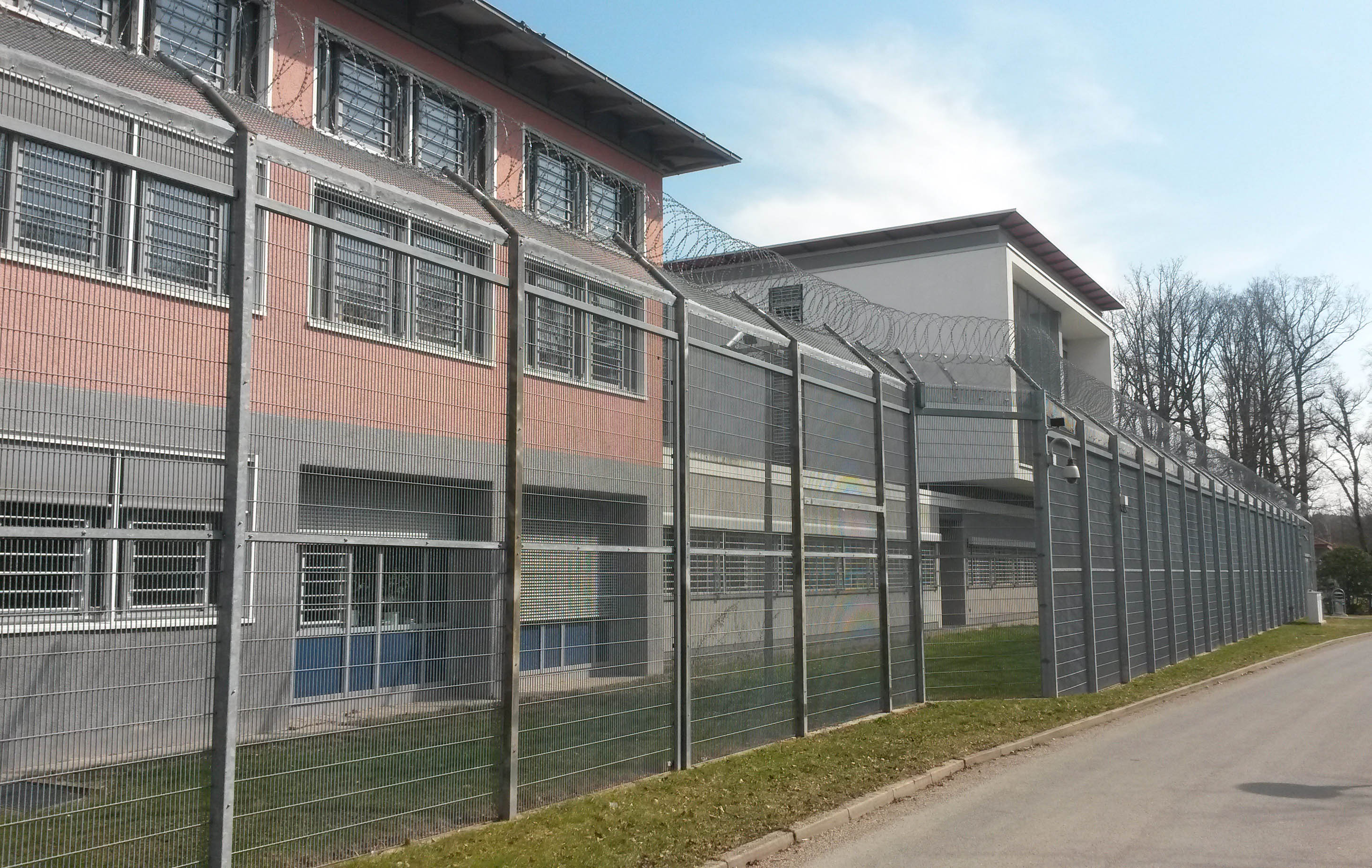 Forensische Psychiatrie (Bezirksklinikum Ansbach)